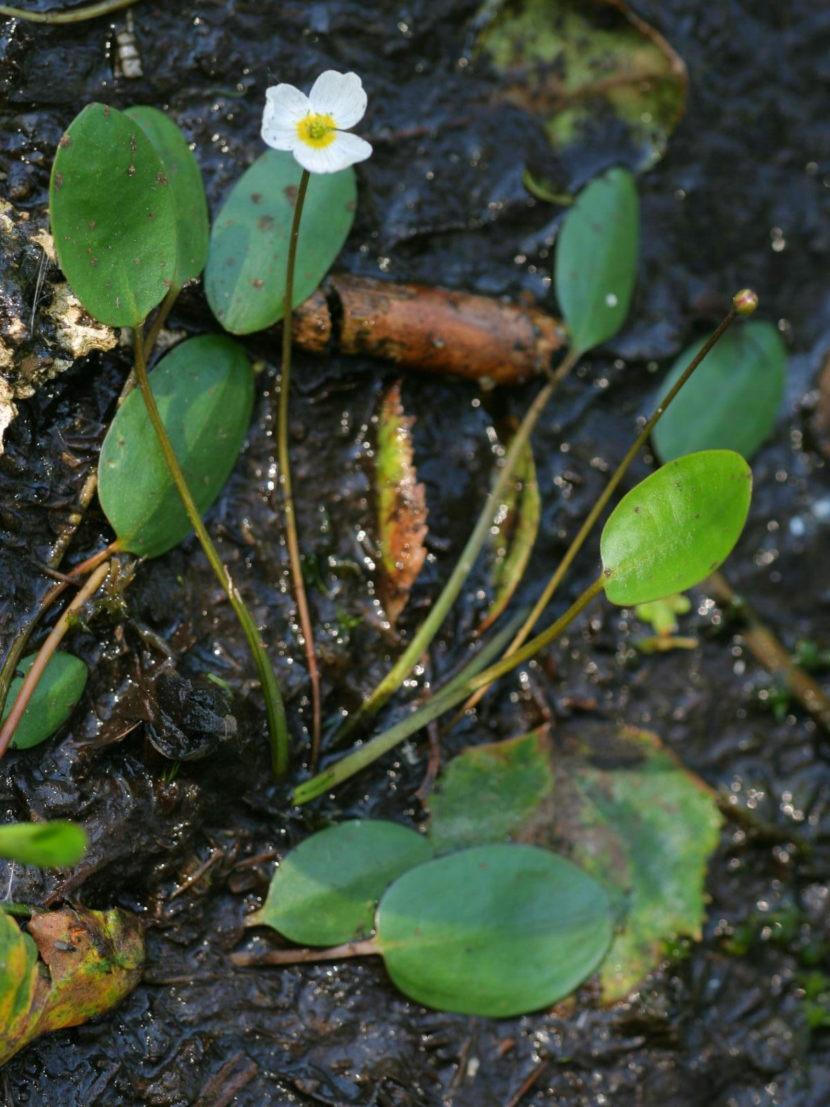 Schwimmendes Froschkraut (Luronium natans)